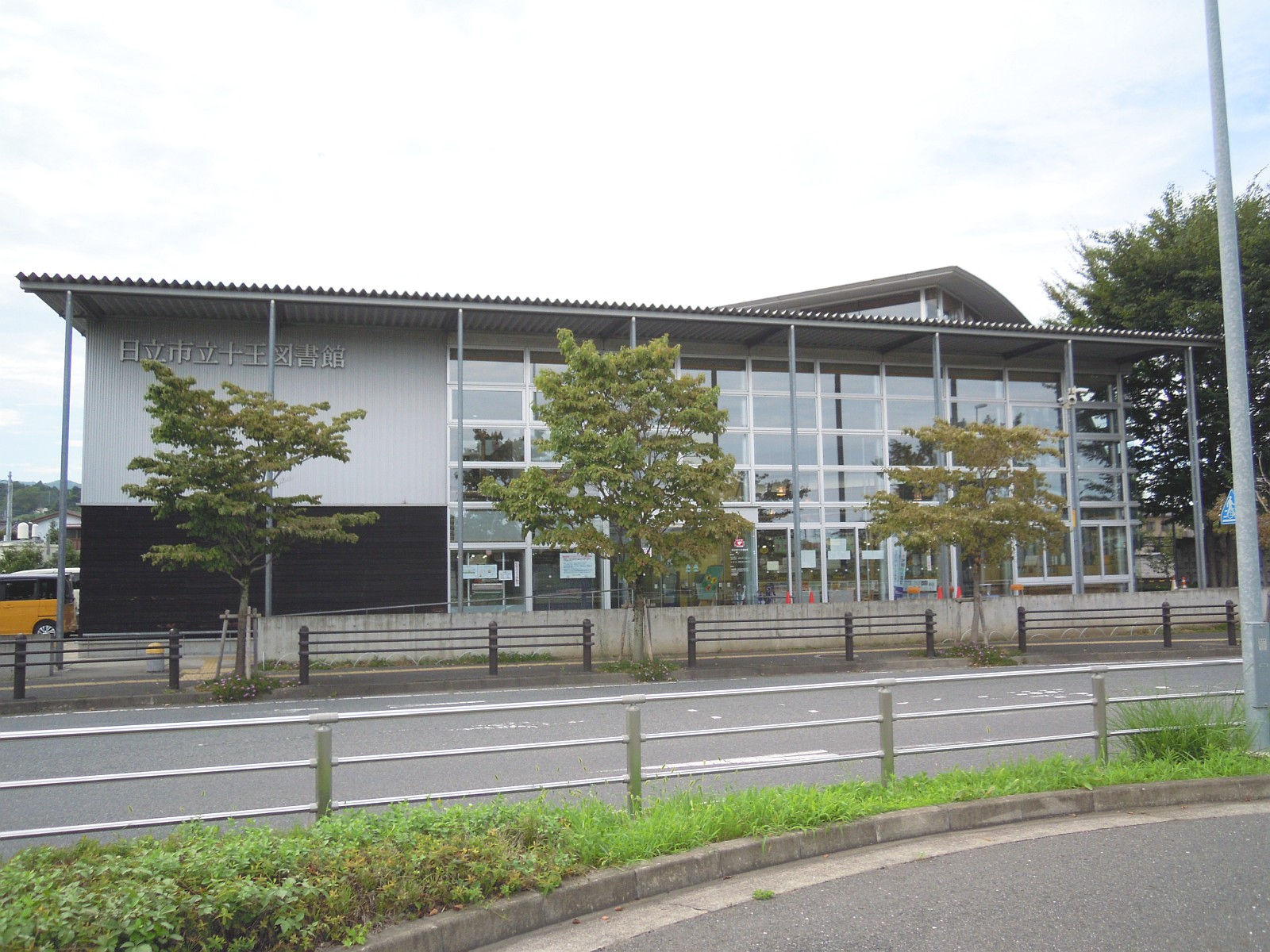 茨城県日立市ある日立市立十王図書館を正面から。